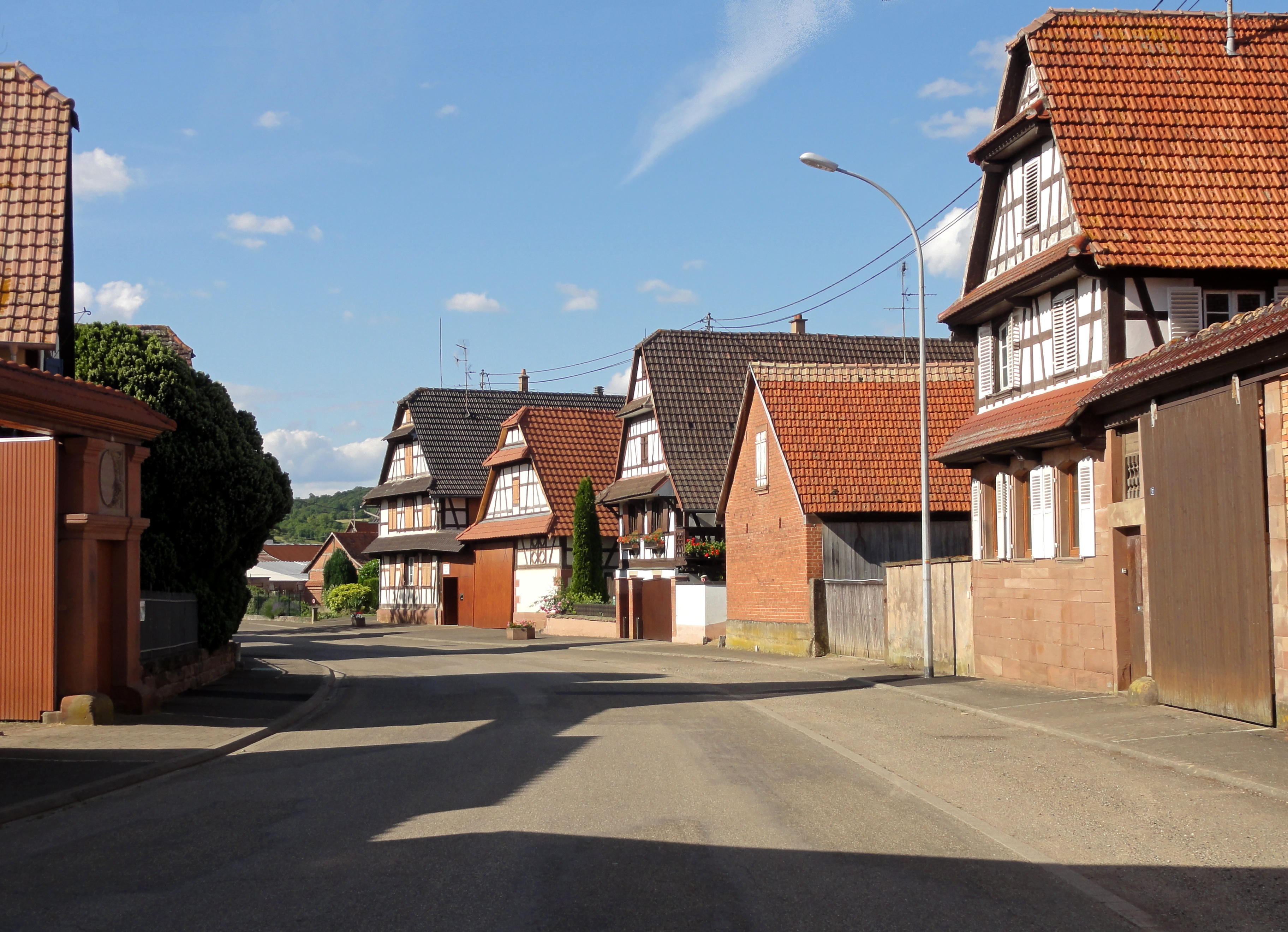 Alsace, Bas-Rhin, Alteckendorf, Rue Principale.